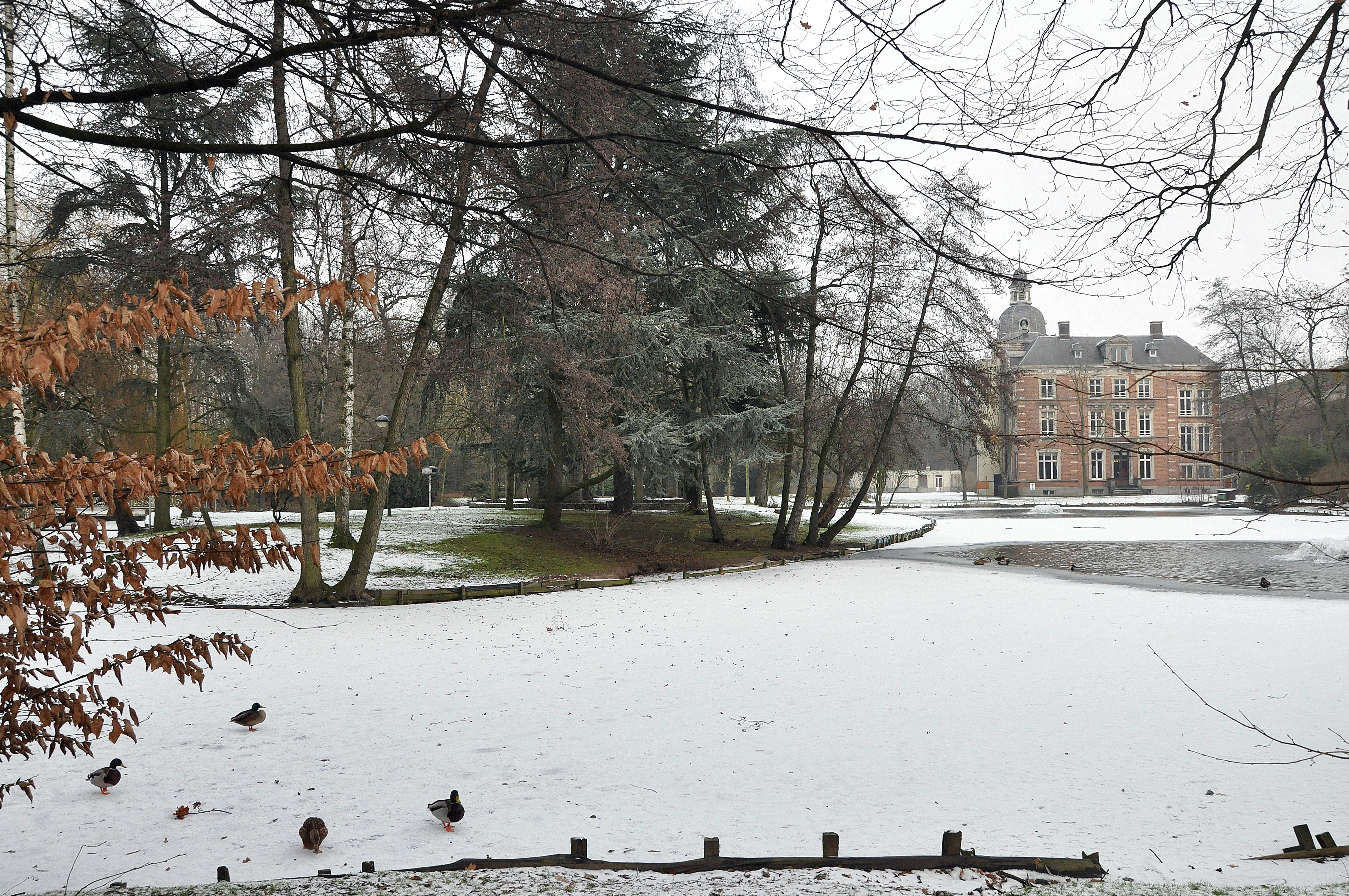 het Braemkasteel te Gentbrugge, België